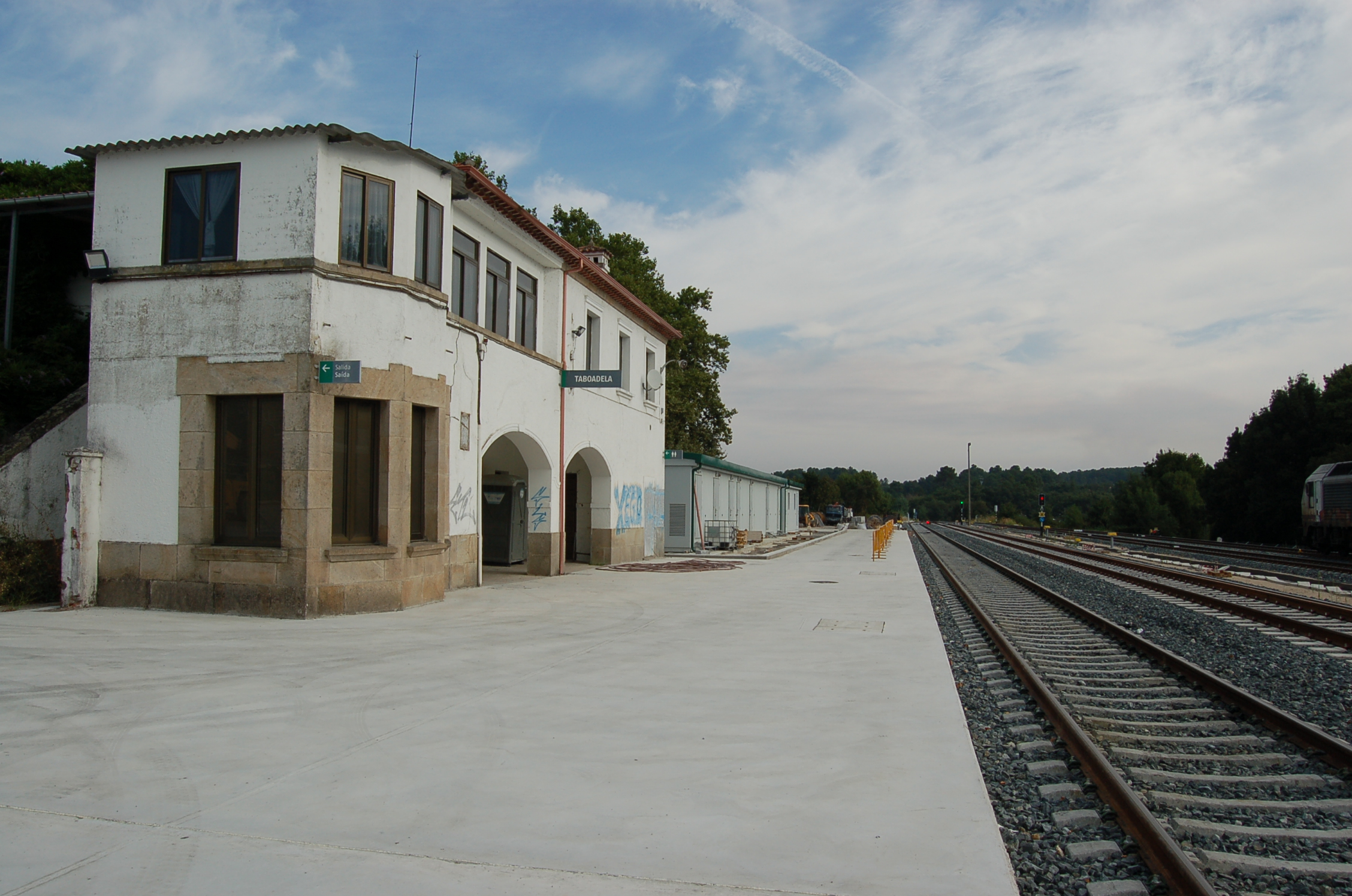 Estación de ferrocarril de Taboadela, en Veredo, O Mesón de Calvos